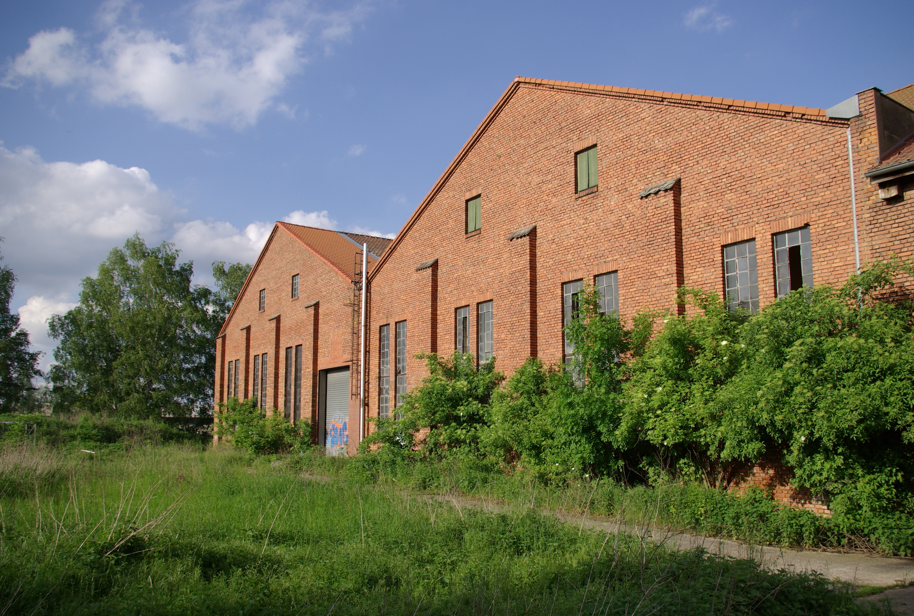 Ehemalige Ziegelei im Erlanger Stadtteil Eltersdorf